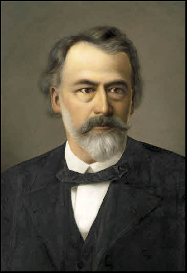 Portrait George André Lenoir